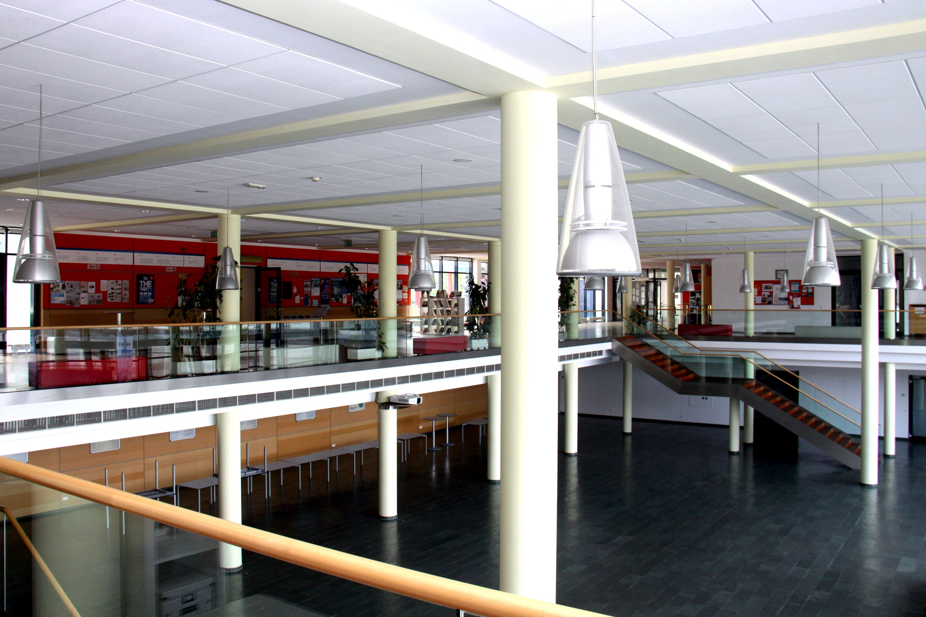 Fachhochschule in Wiener Neustadt, Aula